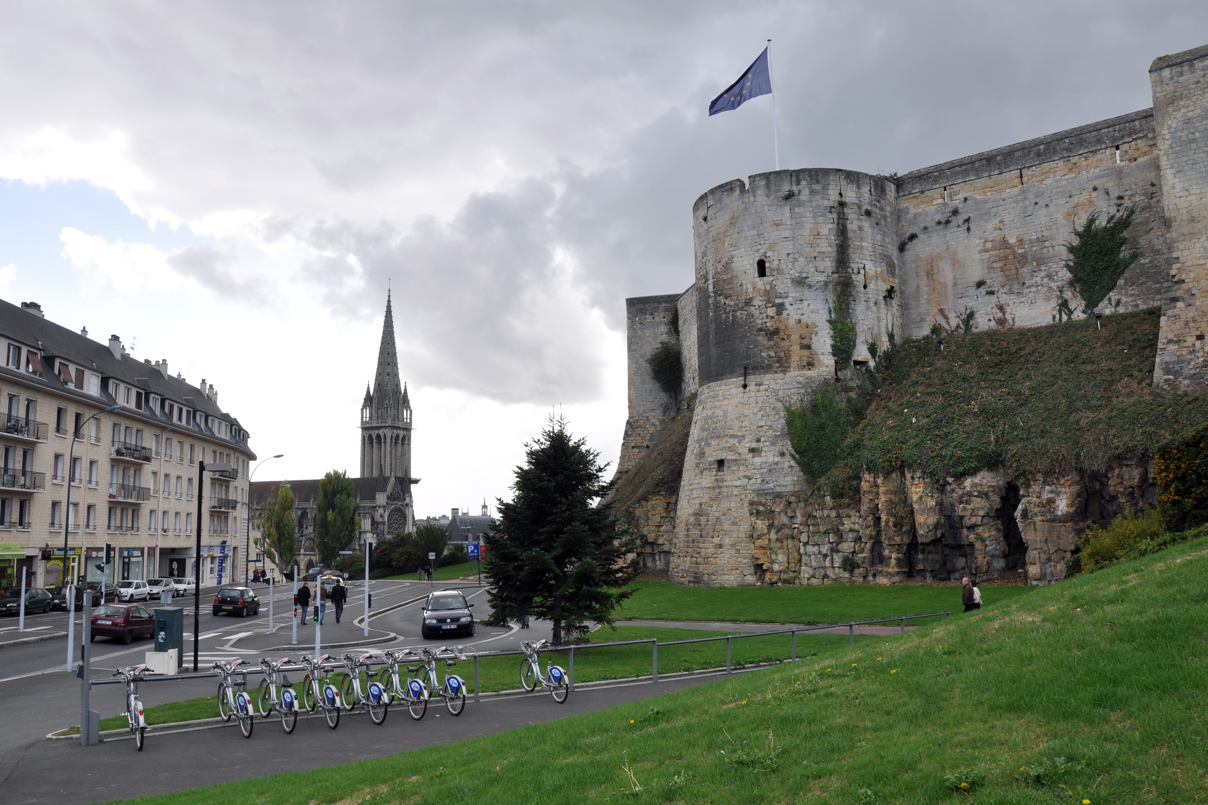 Vue de Caen: le château et l'église Saint-Pierre.